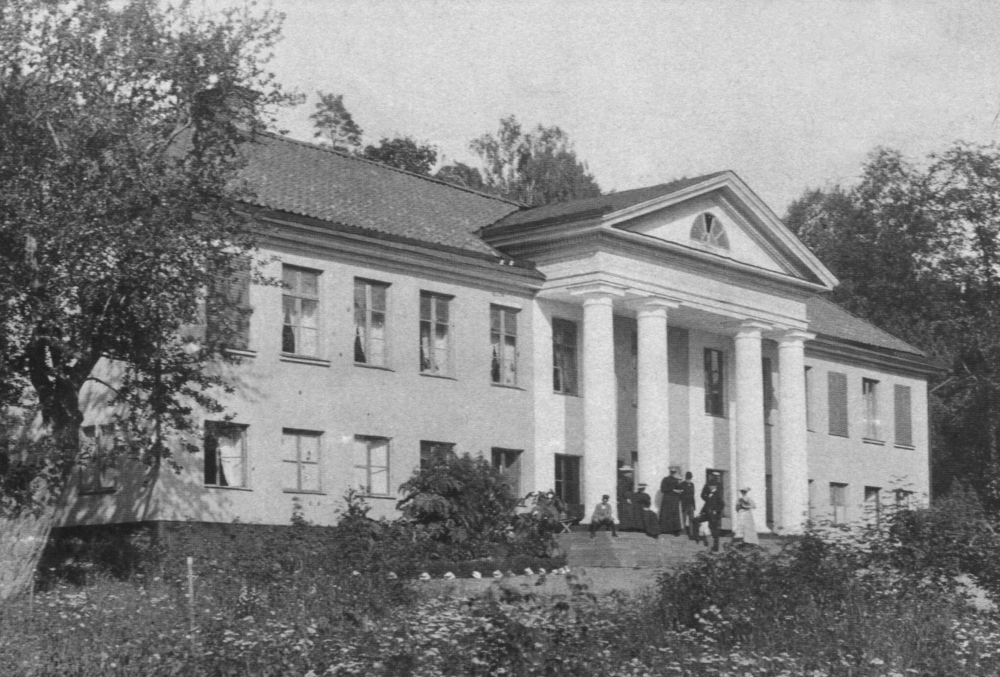 Alby gård innan ombyggnaden av L.M. Ericsson